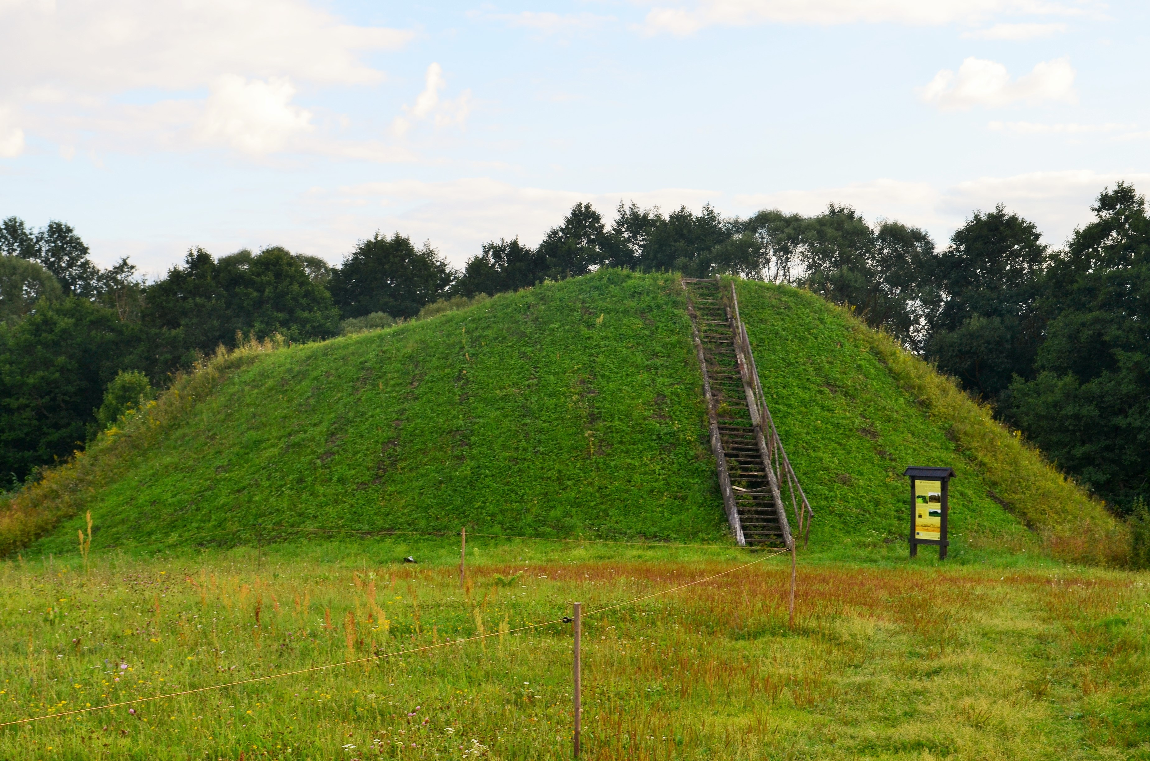 Milžinų kalnas iš šiaurės rytų, Poteronys, Alytaus raj.